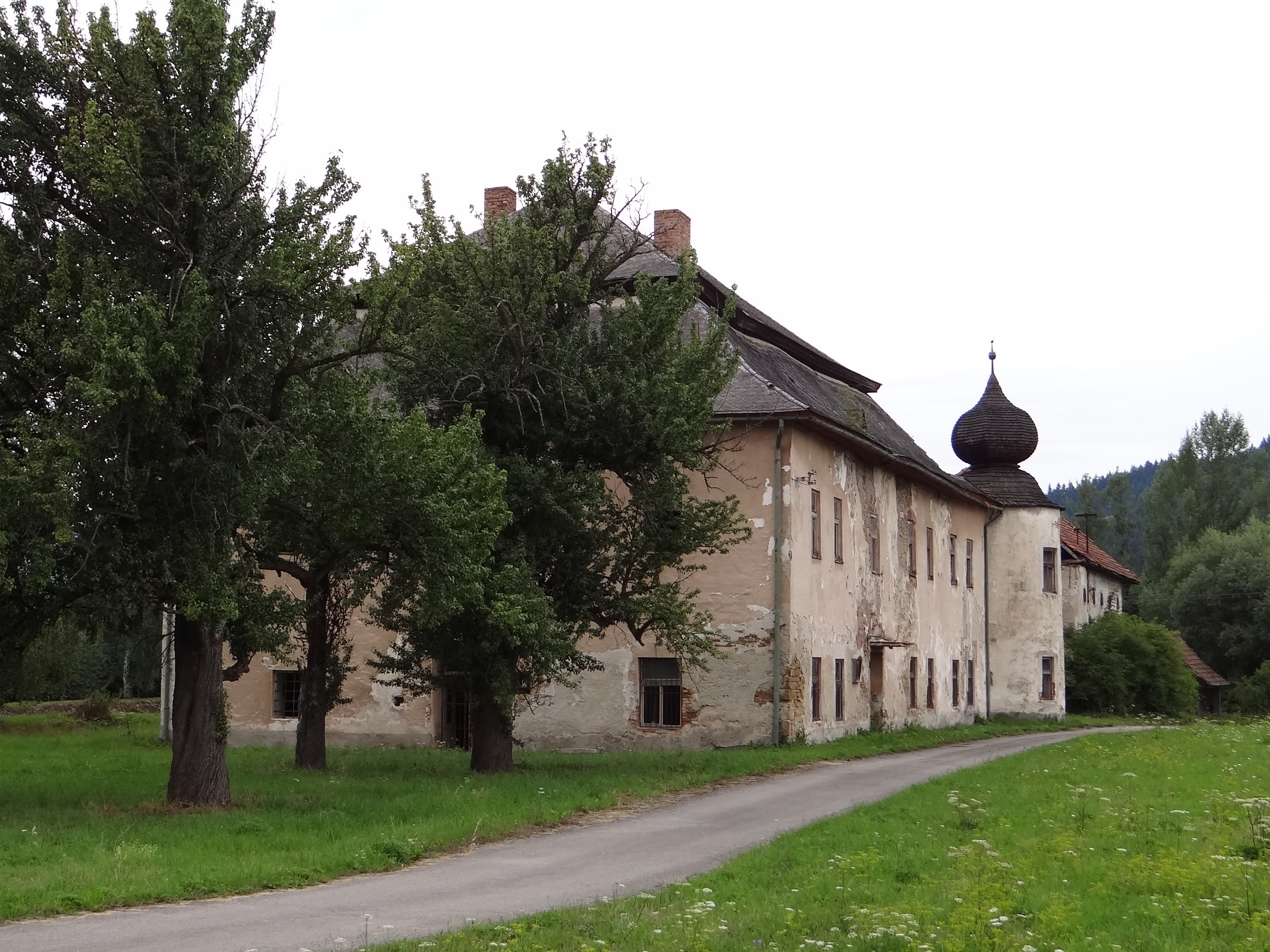 Vlachy